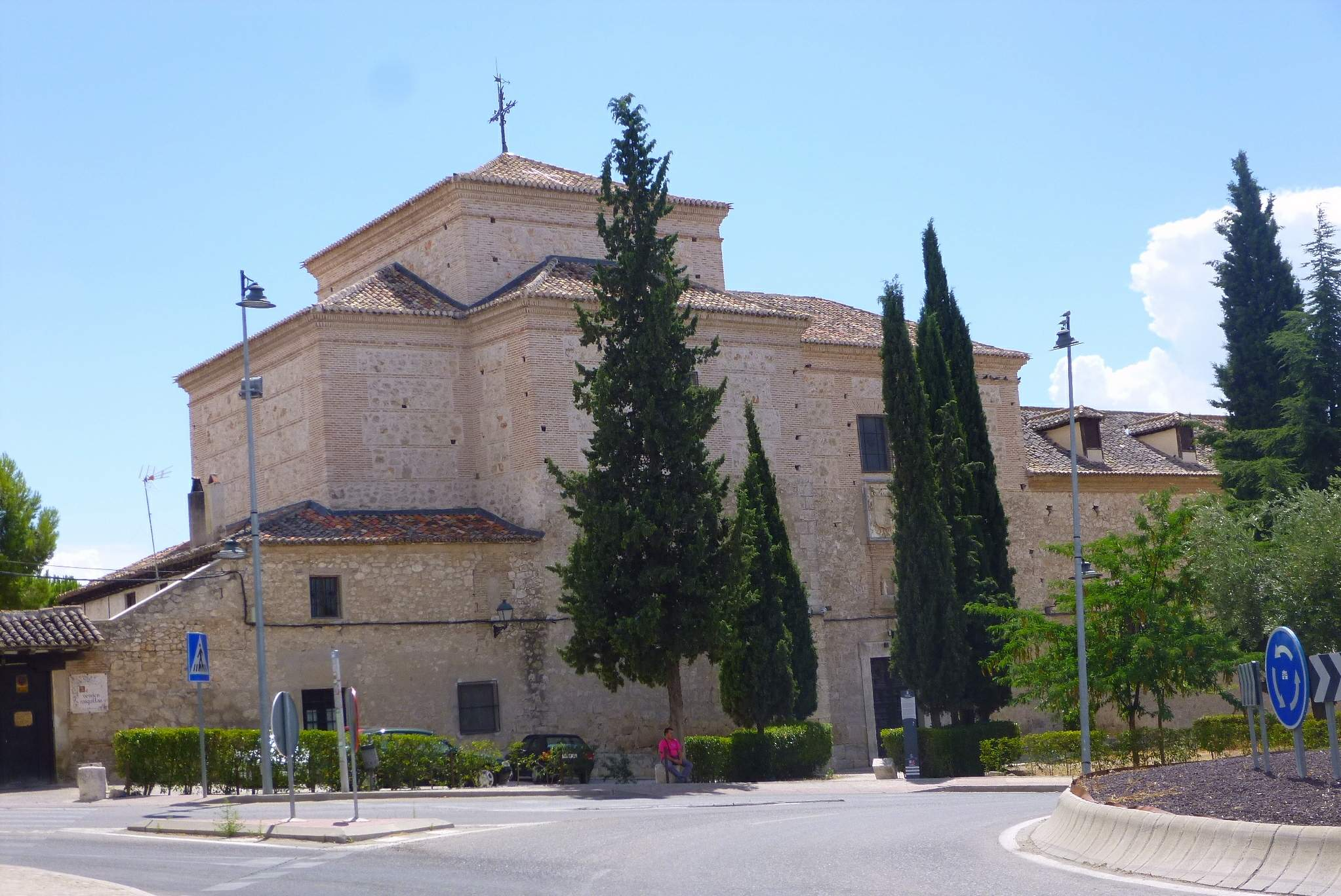 Convento de las Clarisas (Chinchón, Madrid)